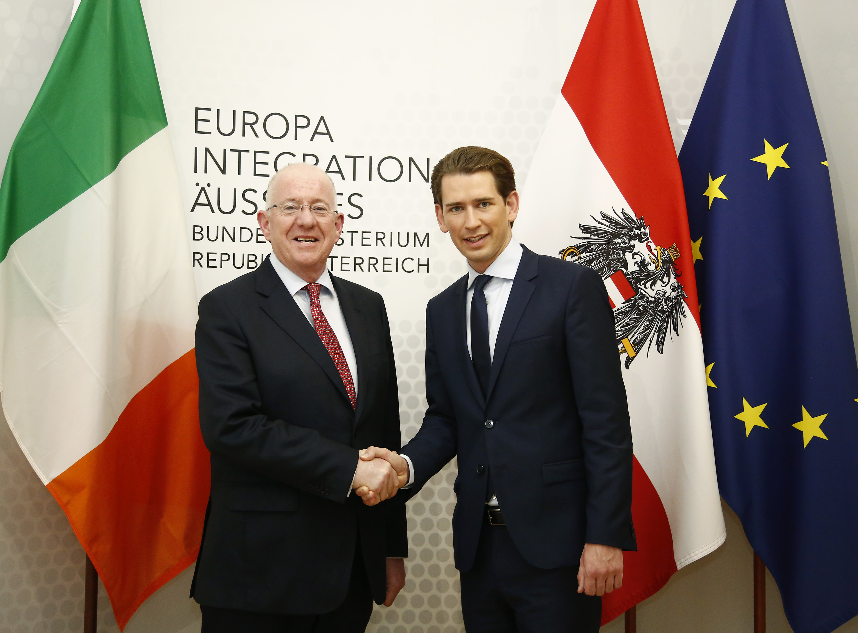 Bundesminister Sebastian Kurz trifft den irischen Außenminister. Wien, 31.05.2017, Foto: Dragan Tatic